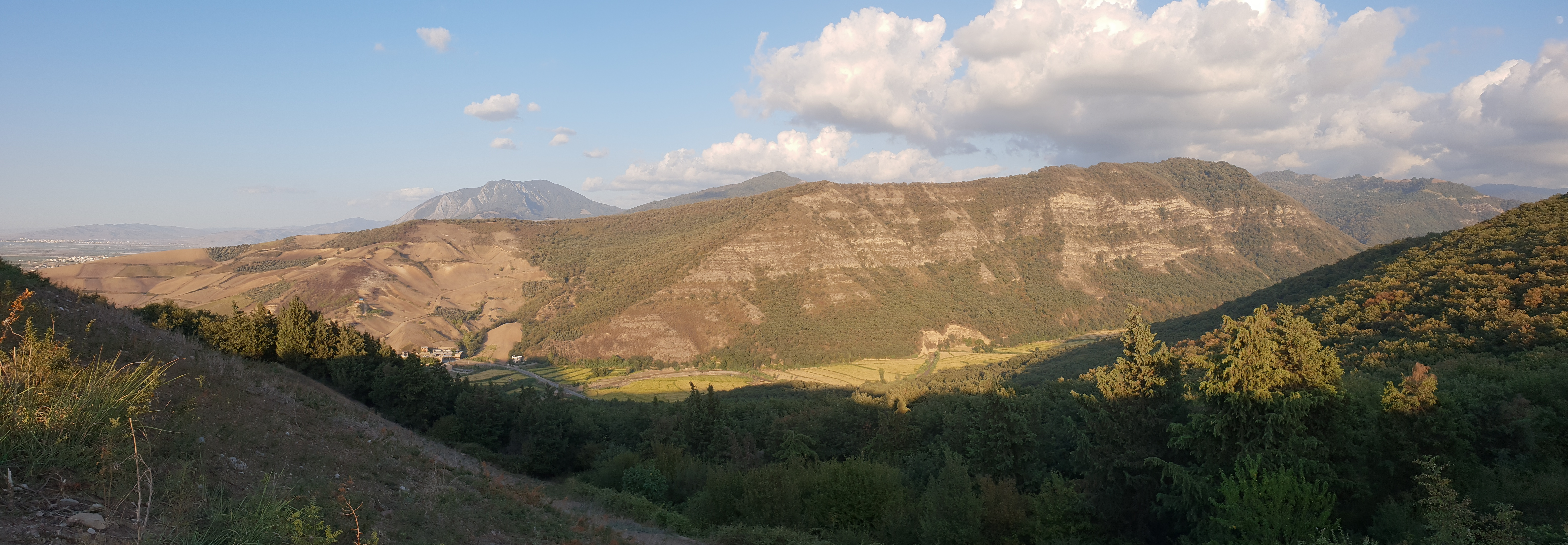 تپه‌های اطراف شهر مینودشت